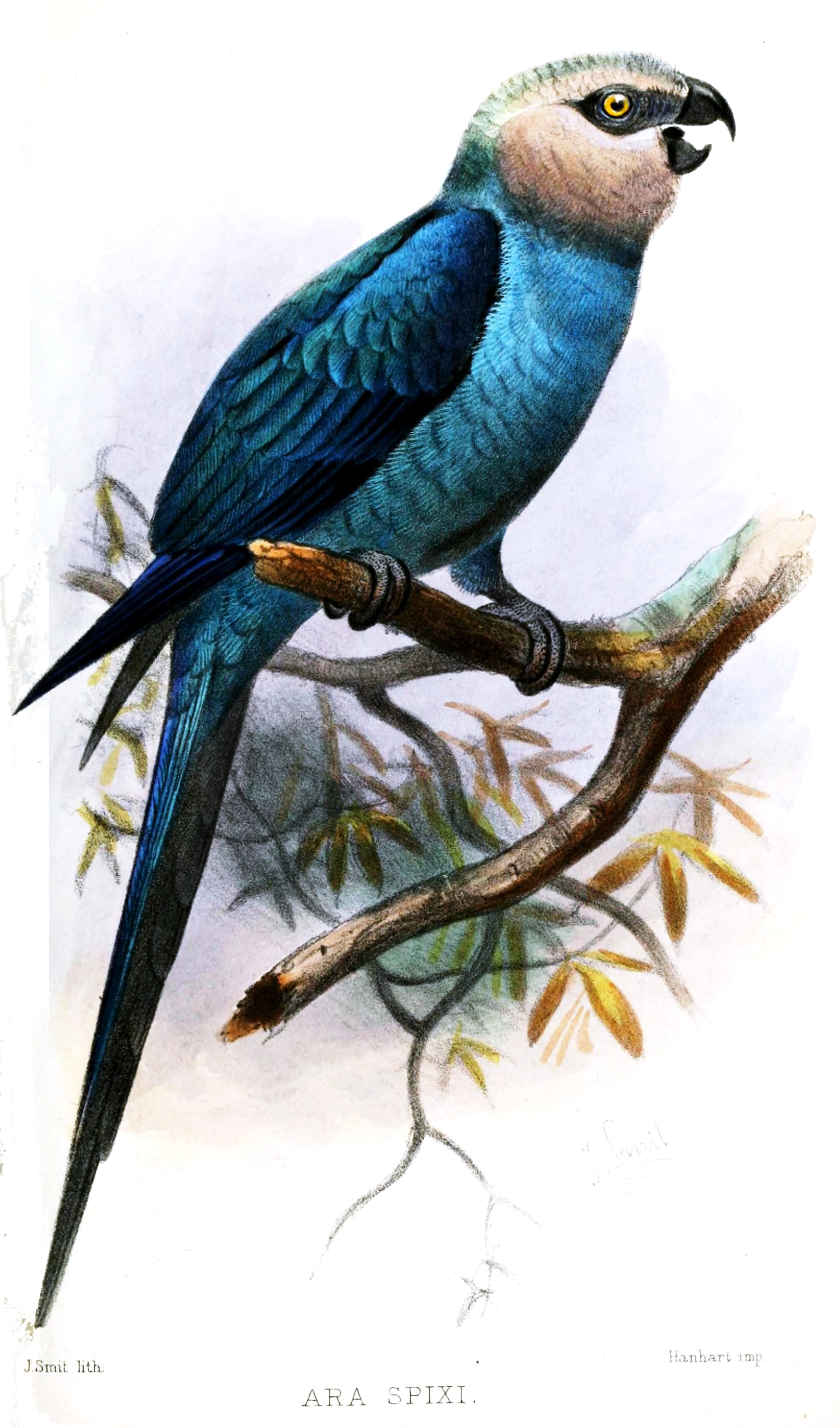 Ara spixi = Cyanopsitta spixii